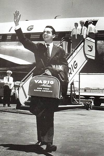 Cauby Peixoto na viagem inaugural do "Super Constellation G" da Varig no ano de 1955, avião qual reduziu 72 horas de voo para 20 horas.